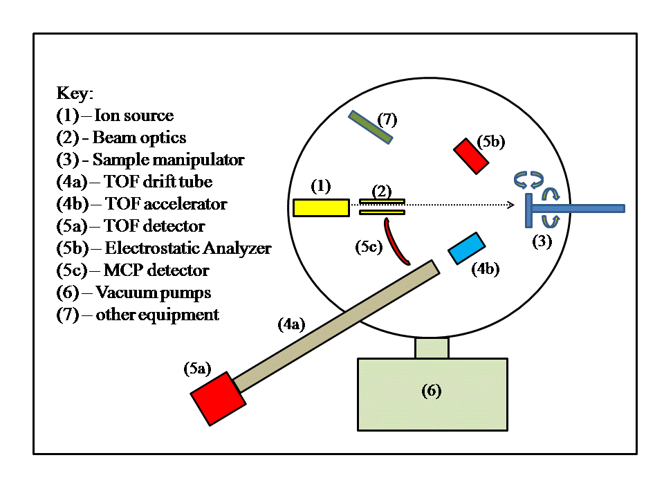 Diagram of general LEIS experimental setup